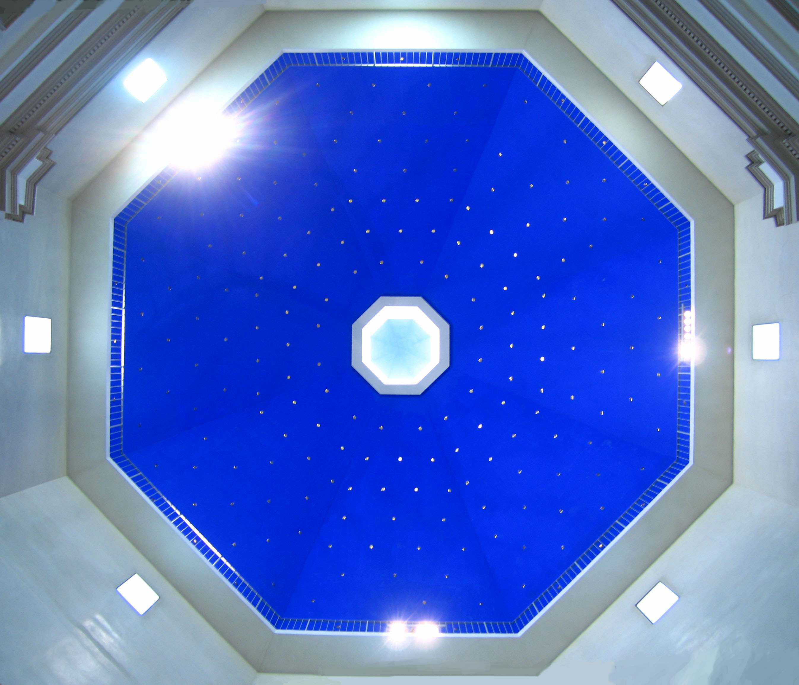 Cúpula de l'església de Sant Pius V, València